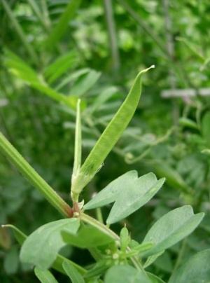 Листови метаморфозирани у рашљике чести су код биљака из фамилије лептирњача (Fabaceae).